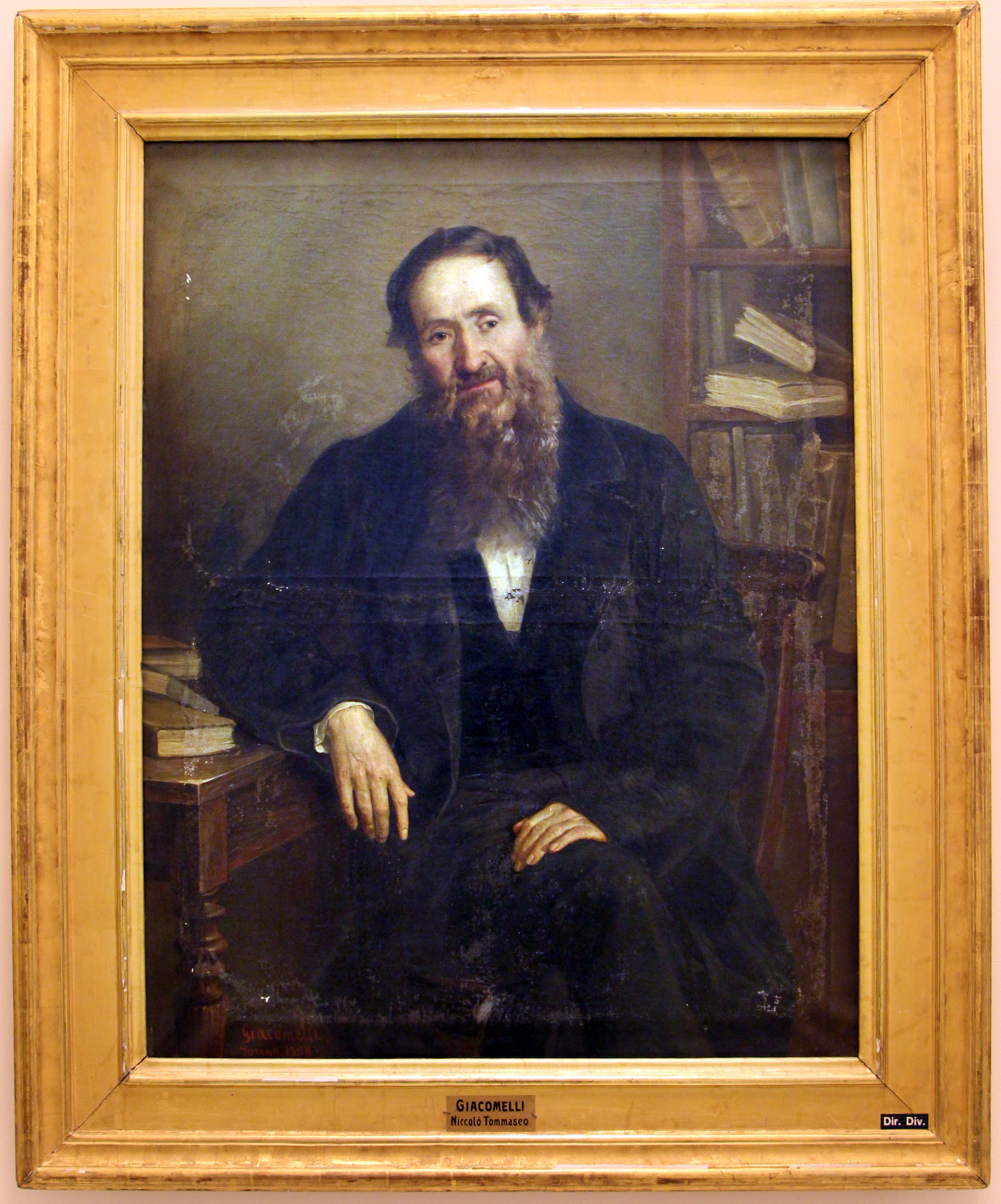 National Central Library of Florence